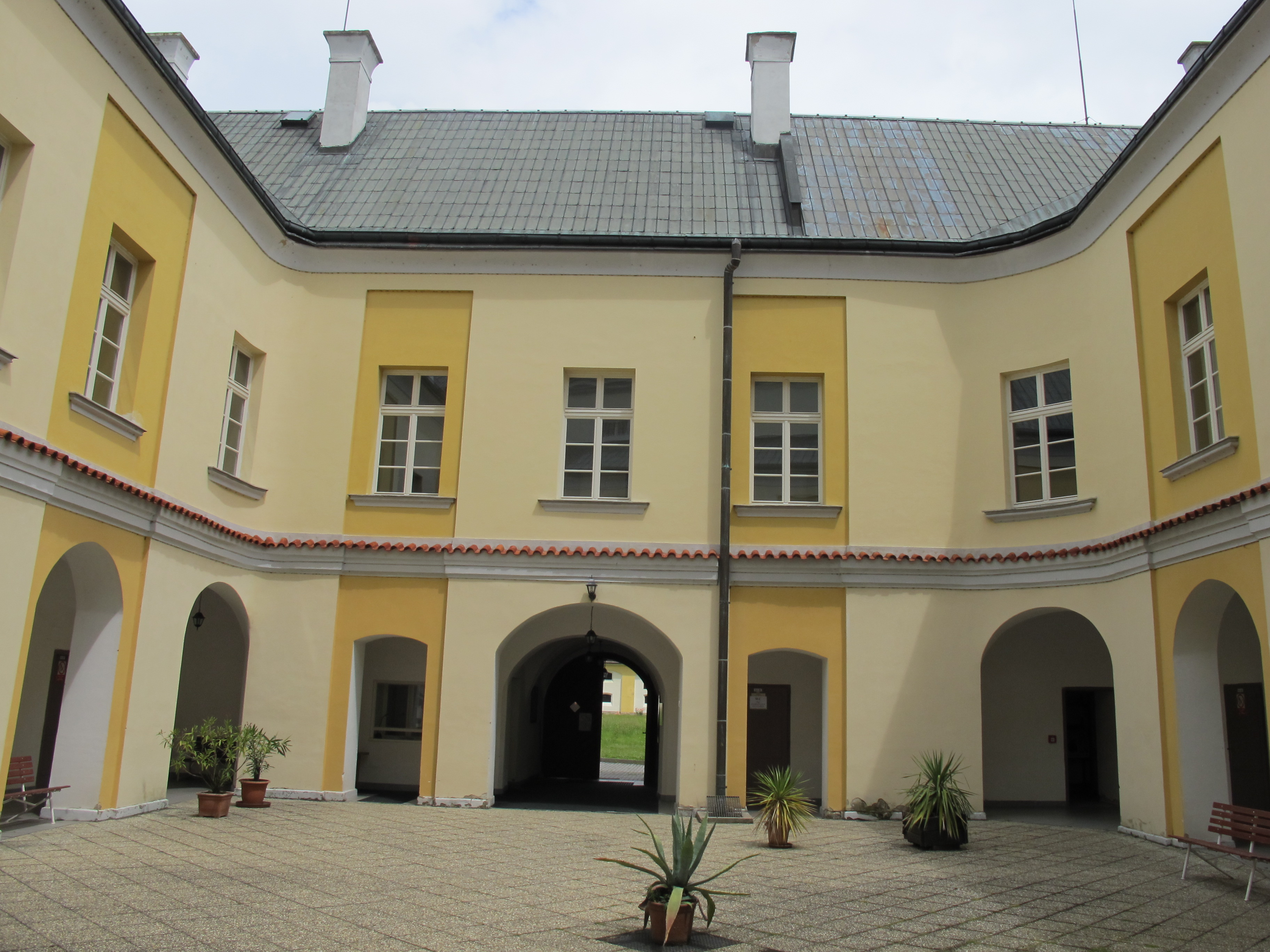 Zámek v Zámrsku, sídlo SOA Zámrsk.